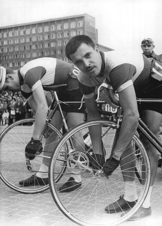 Gainan Saidushin, Anatoli Tscherepowitsch Znetralbild Wendorf.Tre.Qu.5.5.1961.XIV. Internationale Friedensfahrt Warschau-Berlin-Prag 1961. 3.Etappe von Olsztyn nach Gdansk am 4.5.1961UBz.Kurz vor dem Start überprüfen die sowjetsichen Fahrer Gainan Saidushin (vorn) und dahinter Anatoli Tscherepowitsch ihre Räder.